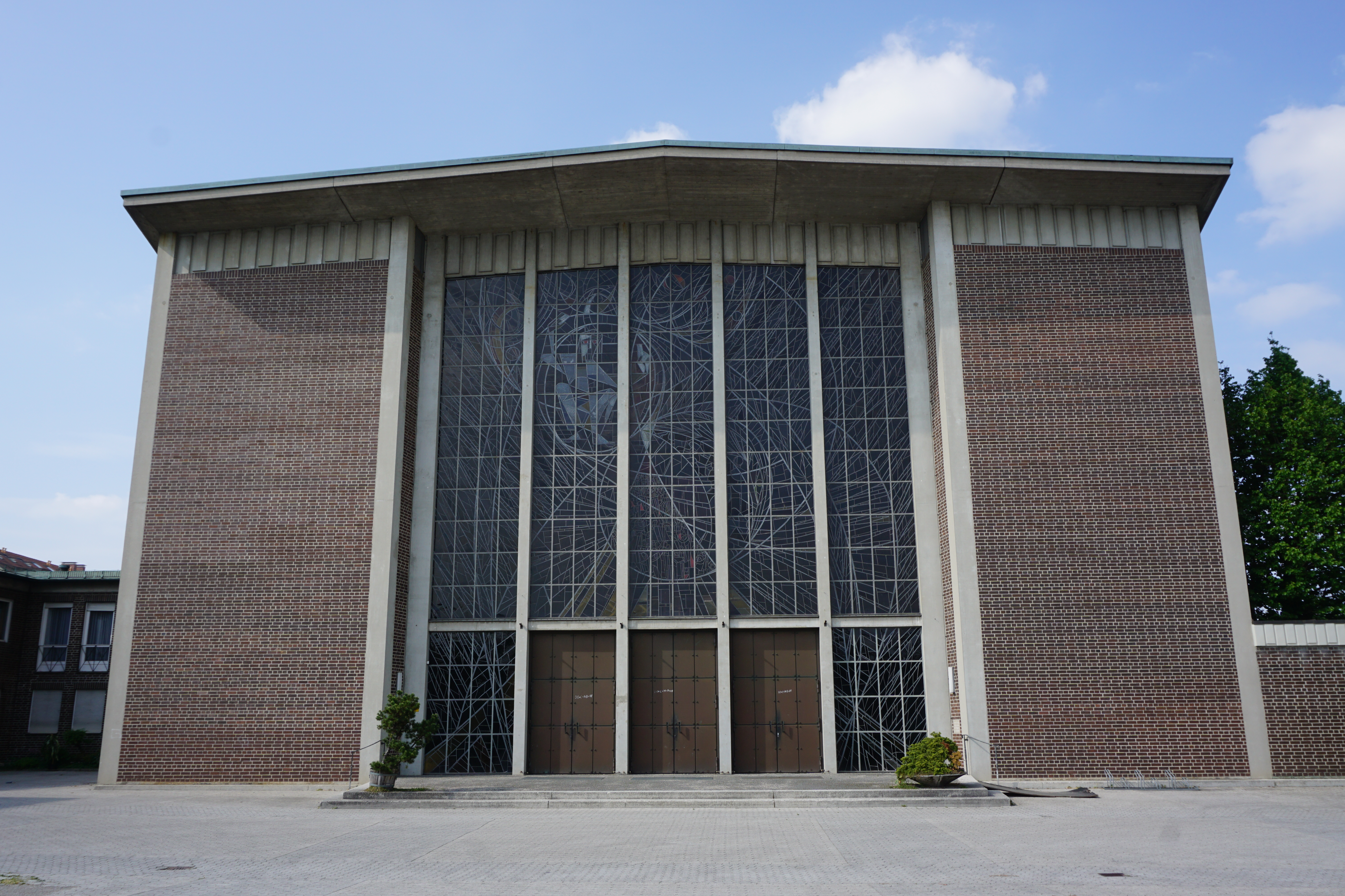 St. Thomas Morus ist ein modernes Kirchengebäude im Münchner Stadtteil Sendling-Westpark. Es ist als Baudenkmal in die Denkmalliste eingetragen.